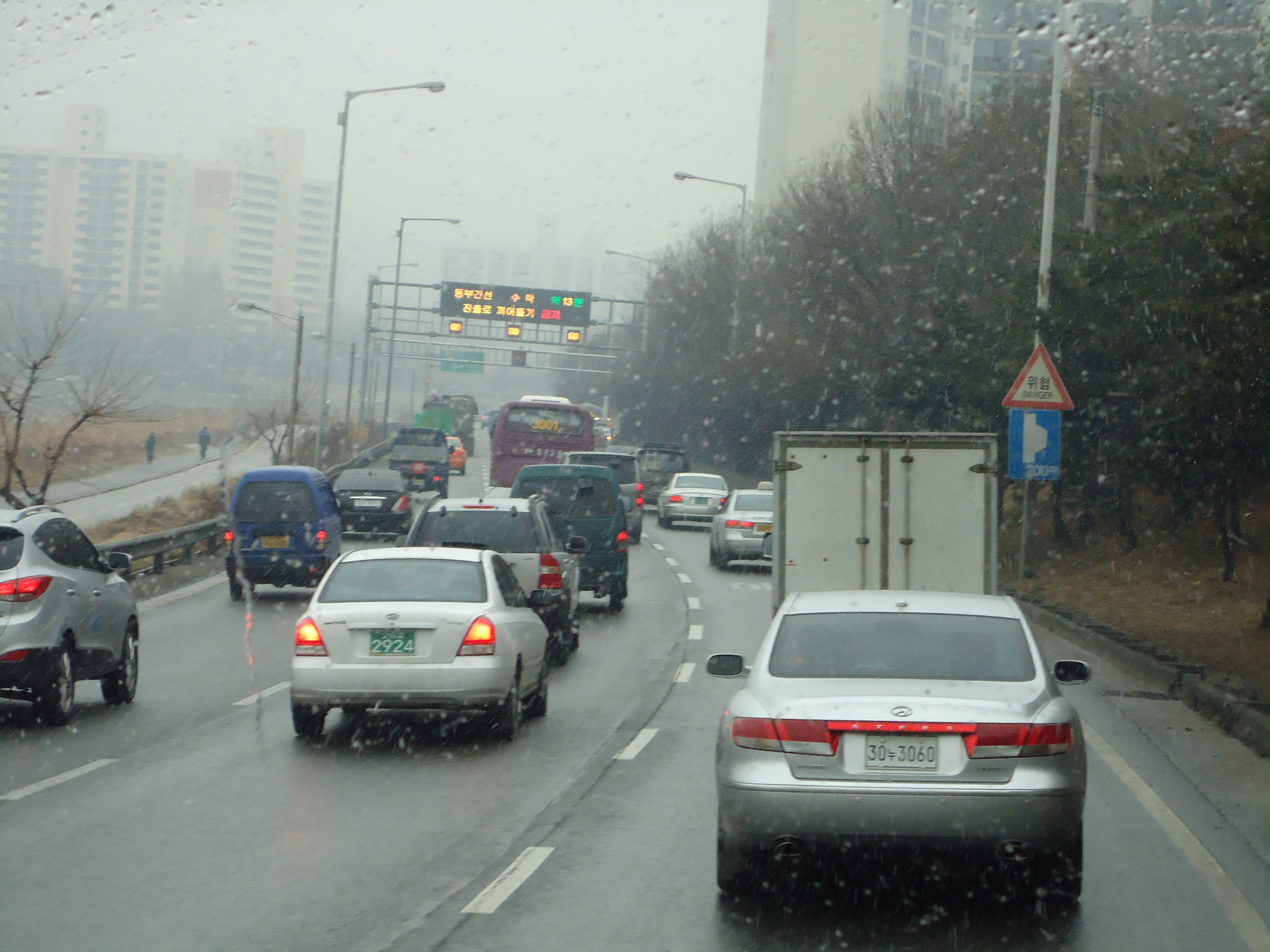 동부간선도로 상습 정체 구간인 월릉교 근처